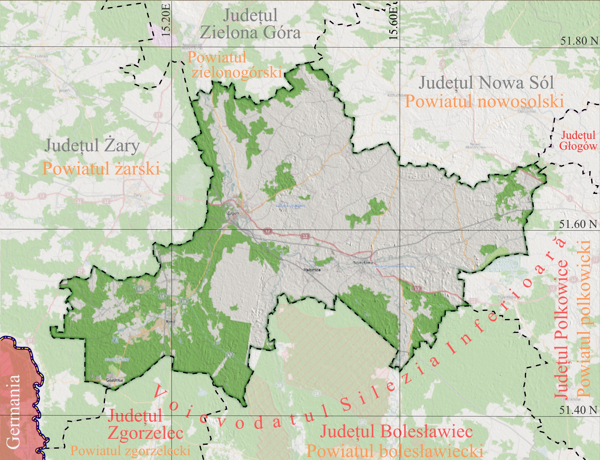 Harta de localizare a Judeţului Żagań din Voievodatul Poloniei, Lubusz. Top: 51.85 Bottom: 51.35 Left: 14.90 Right: 15.95